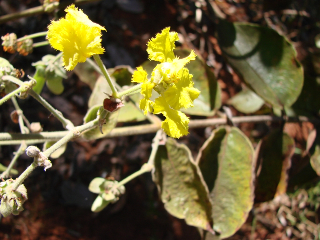 Peixotoa sp. - MALPIGHIACEAE - Jardim Botânico de Brasília - DF - Brasil